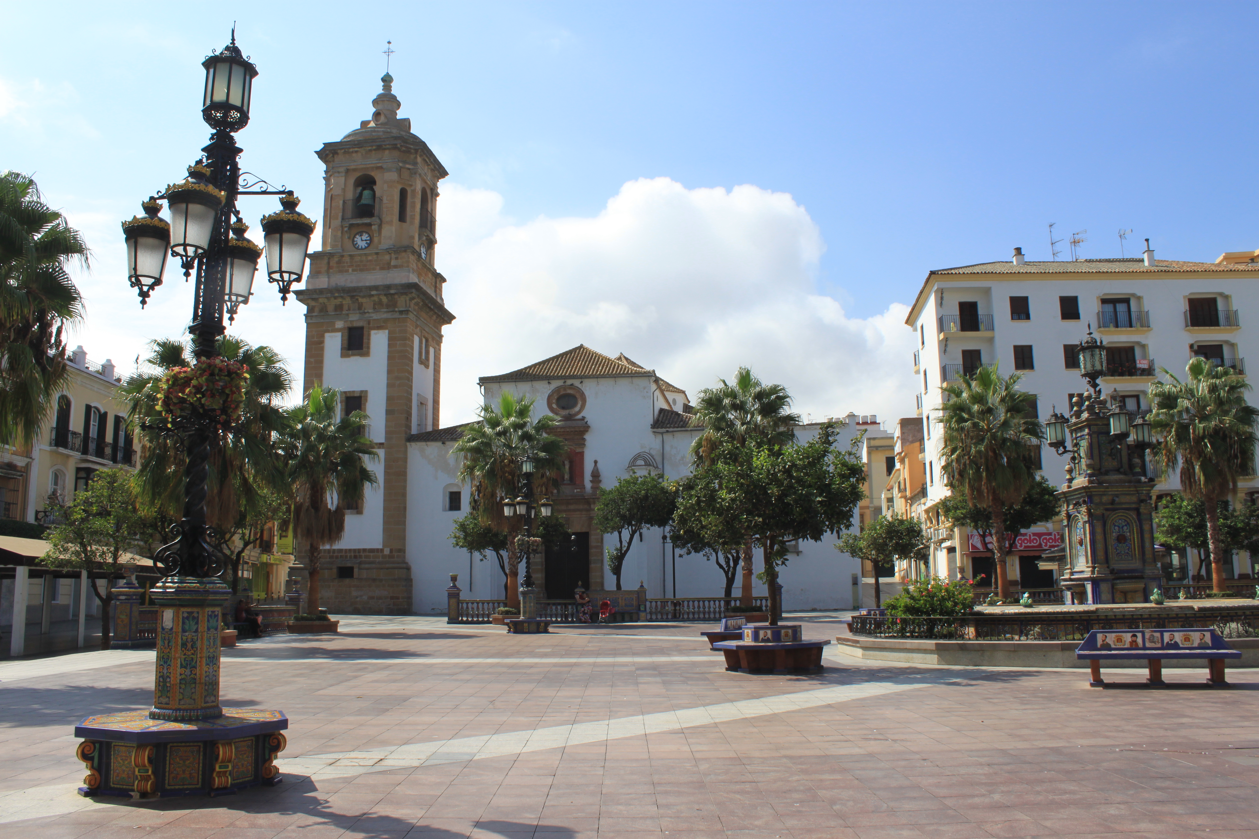 Vista de la Plaza Alta de Algeciras con la Iglesia de Nuestra Señora de la Palma. Andalucía, España.